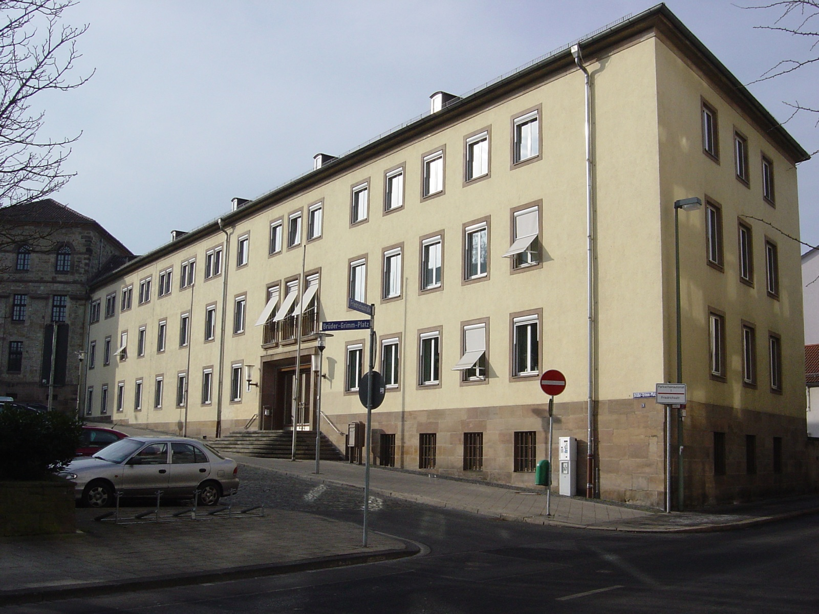 Hessischer Verwaltungsgerichtshof, Brüder-Grimm-Platz 1 (Ecke Friedrichsstraße) in Kassel